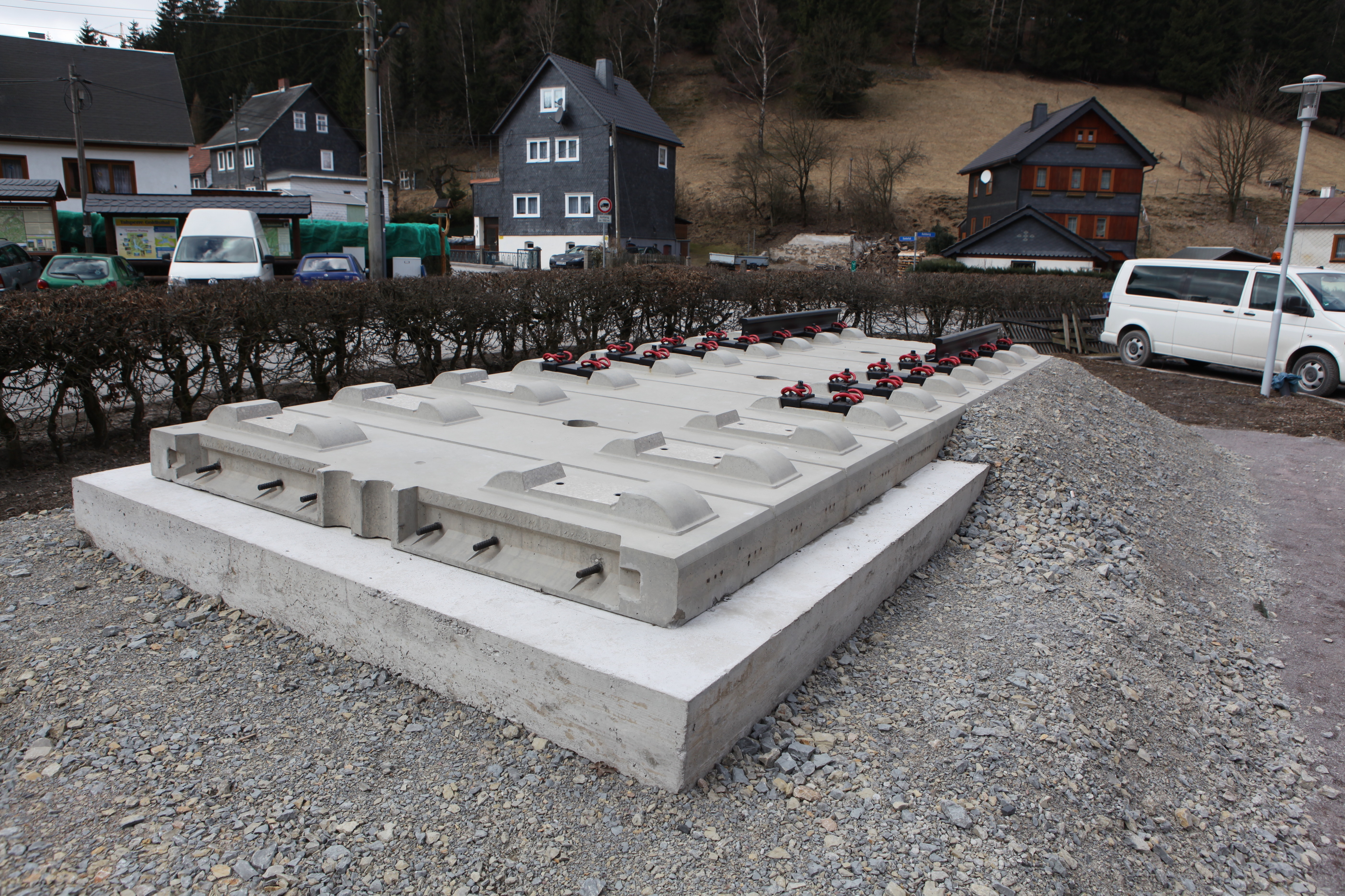 Feste Fahrbahn System Boegl, in Goldisthal aufgebaut